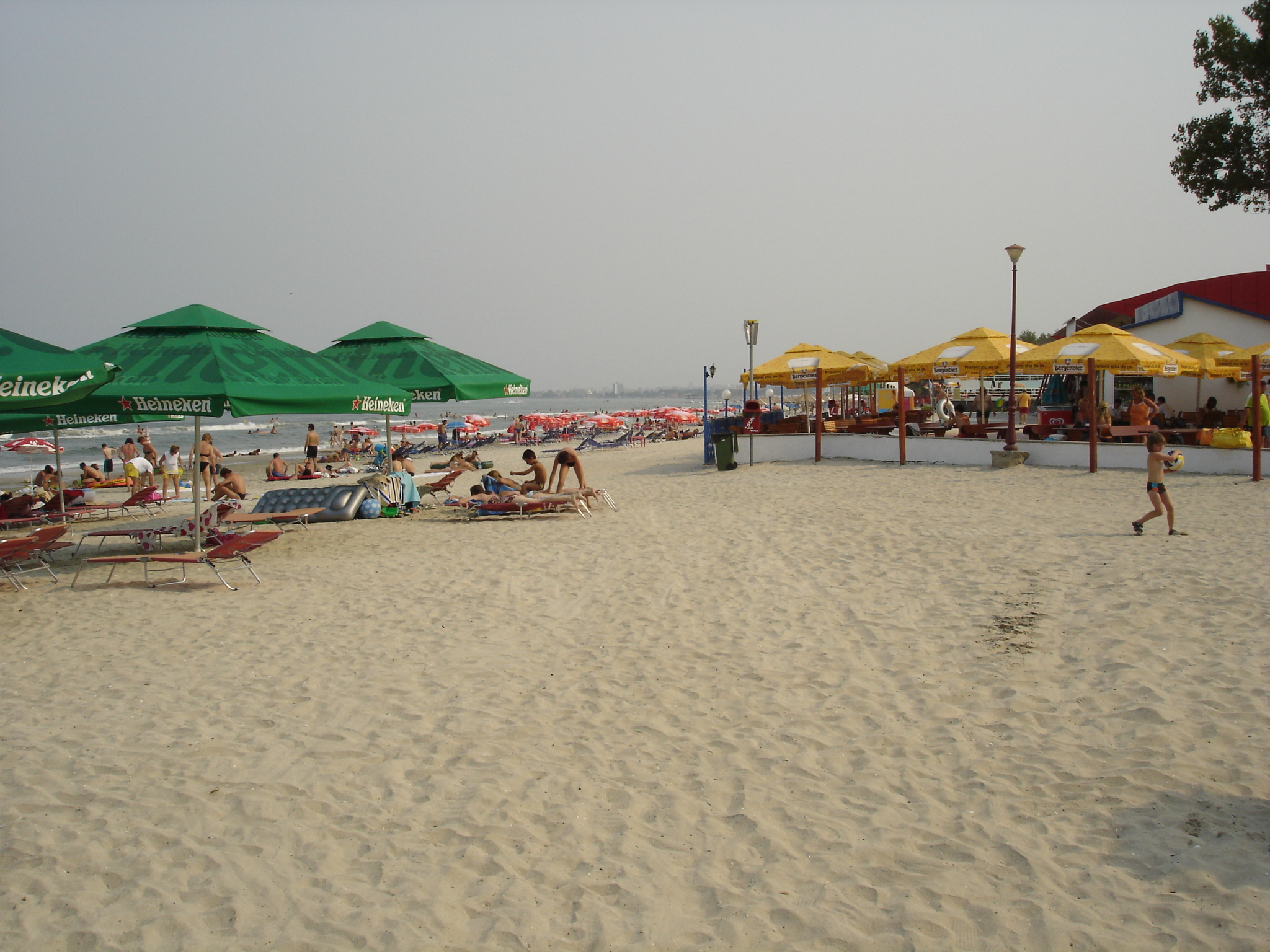 Resort Mamaia near Constanţa